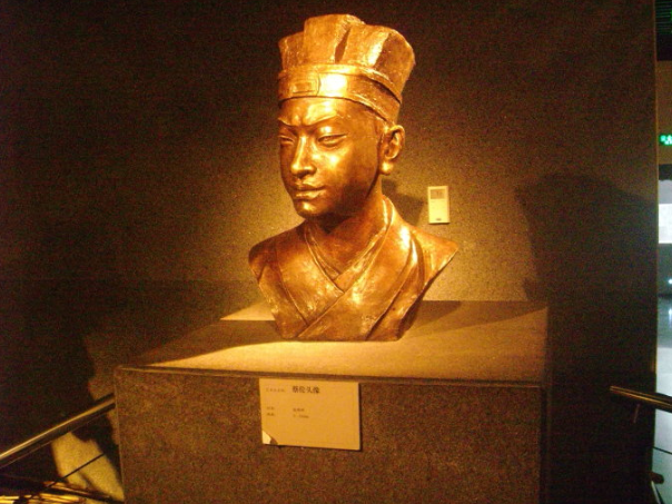 National Museum of Chinese Writing